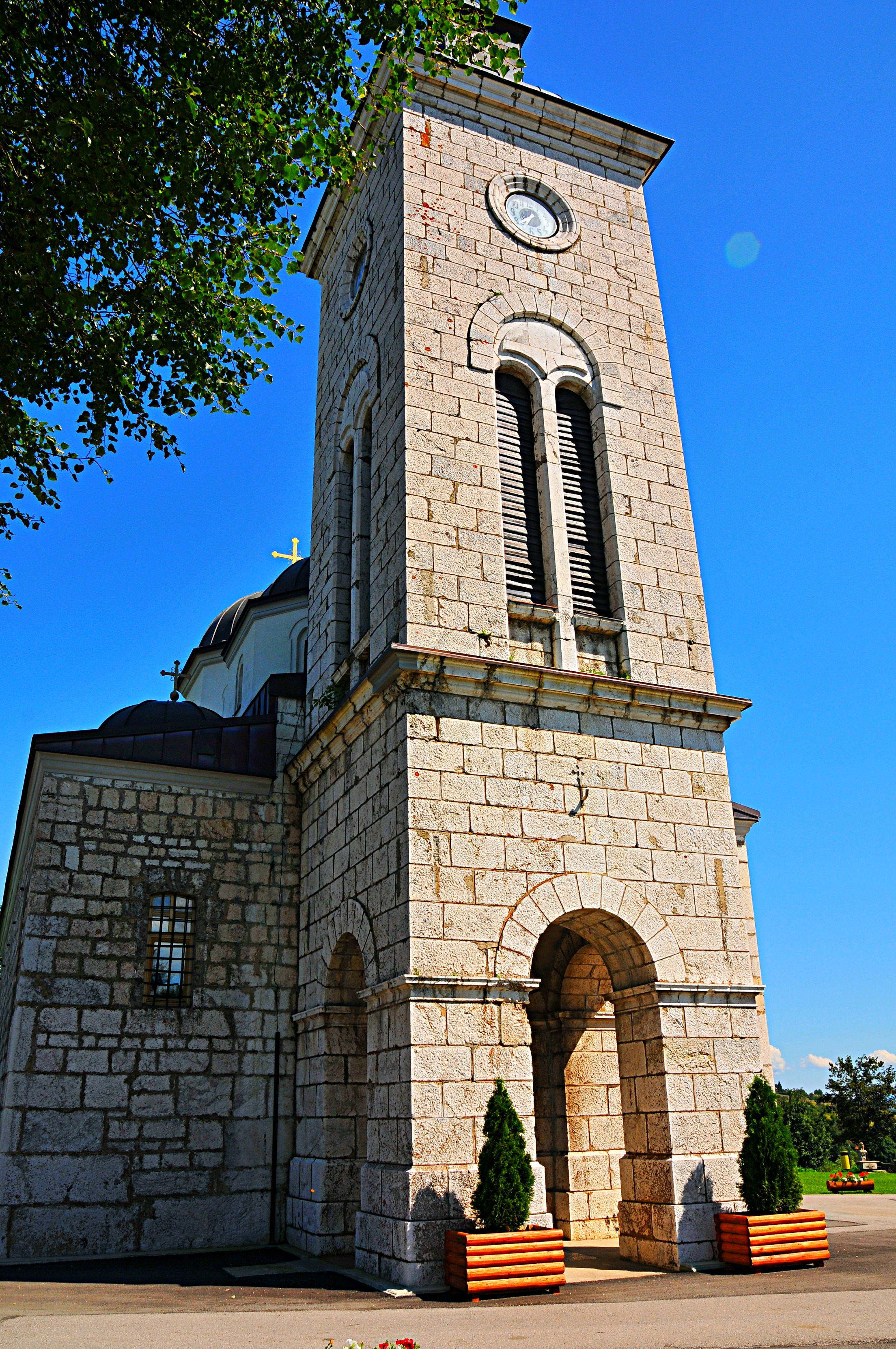 This image was uploaded as part of Trace of Soul 2016.